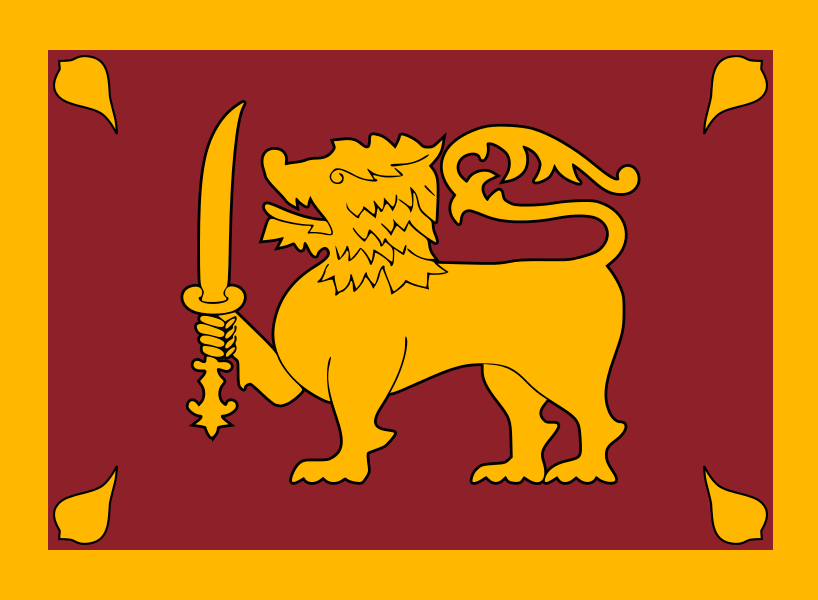 සිංහල: සිංහලේ ධජය